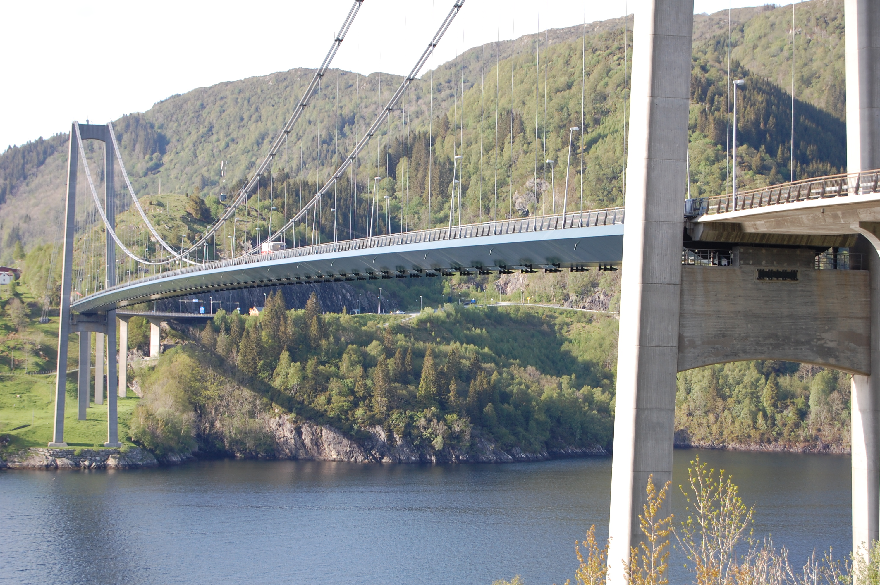 Osterøybroen